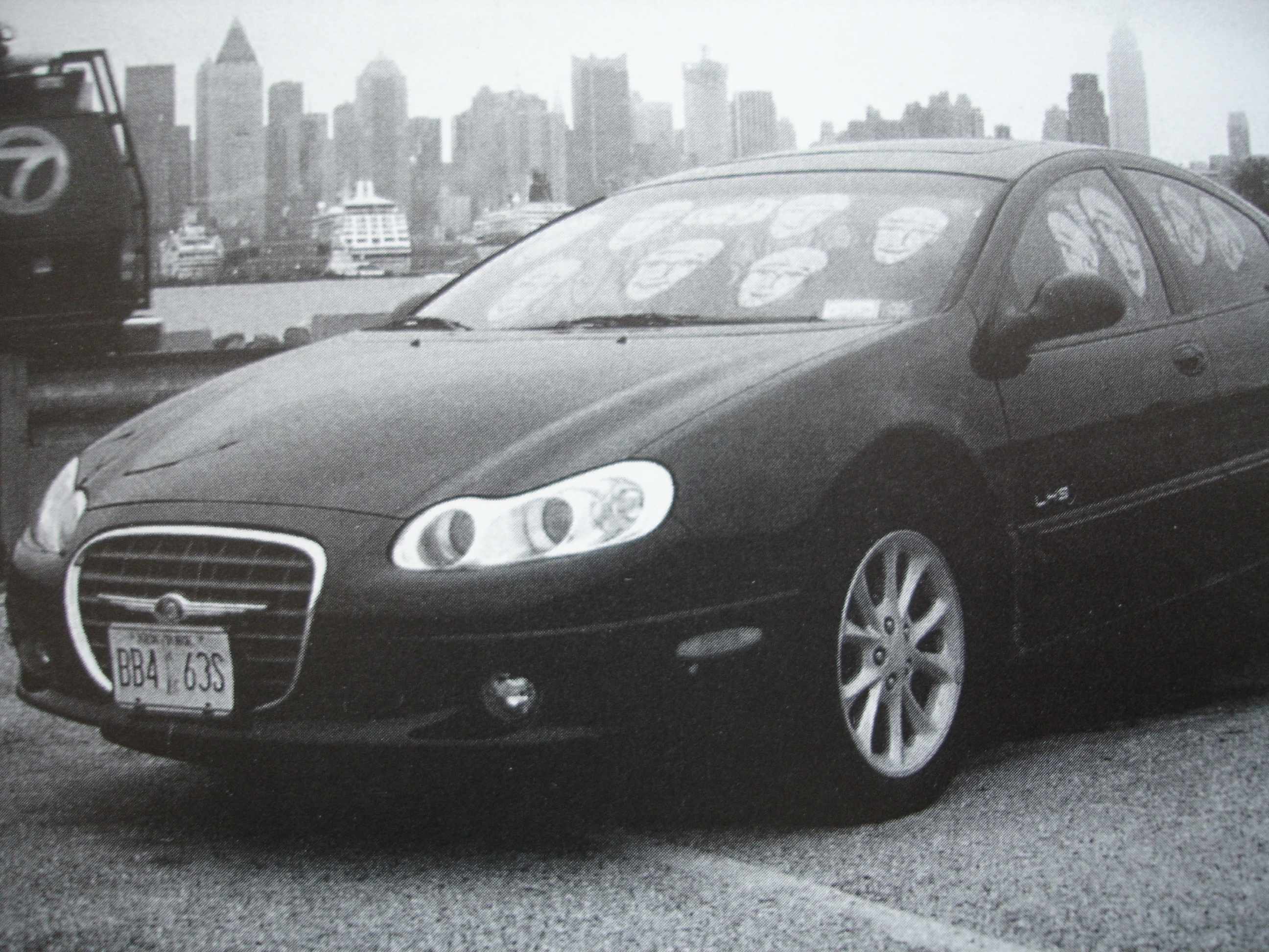 Defunctionalism